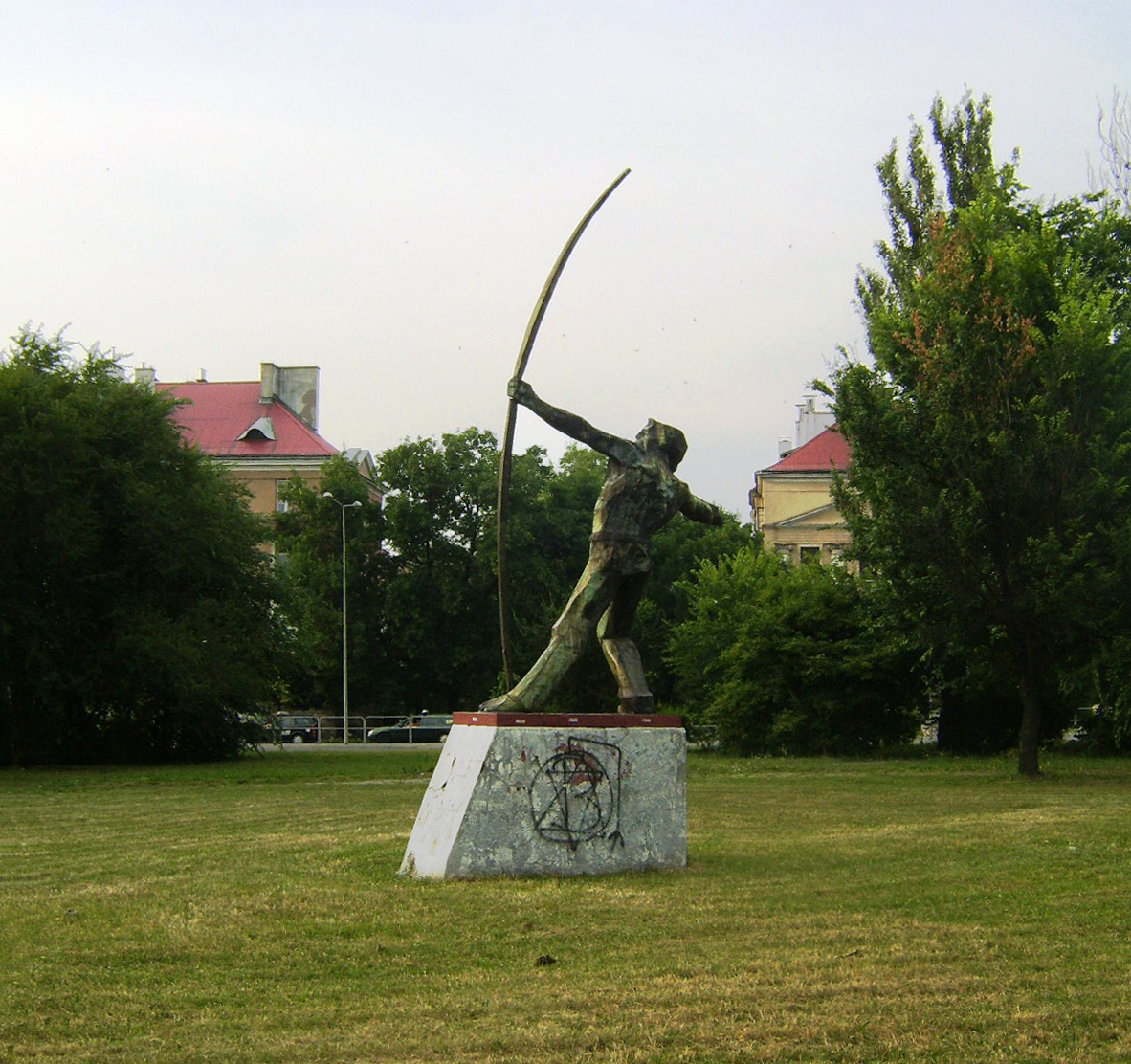 Łucznik przy ulicy Grzecznarowskiego w Radomiu